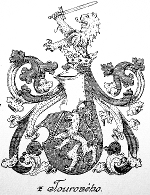 pravděpodobný původní erb rodu